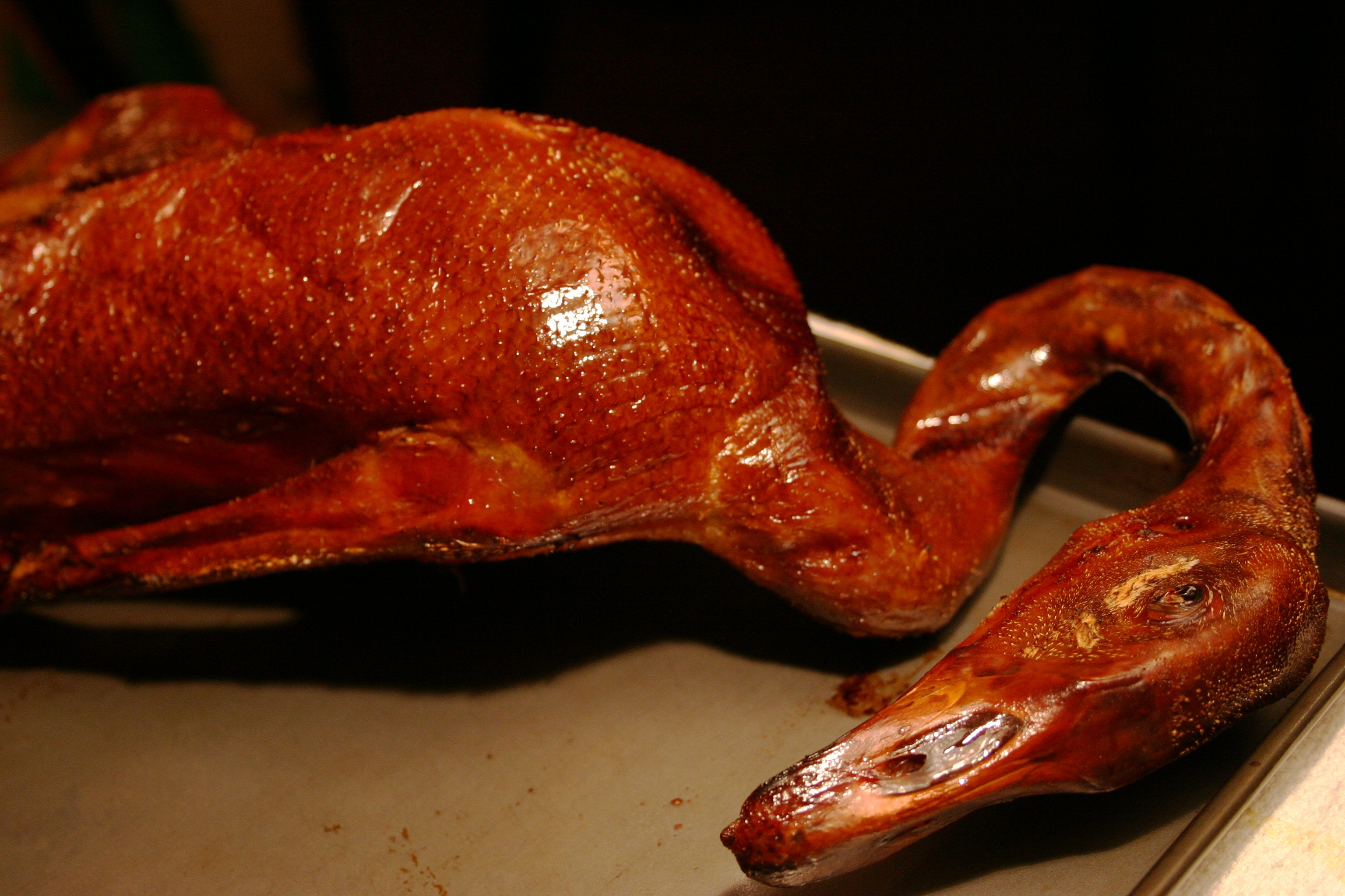 Roasted goose siu mei